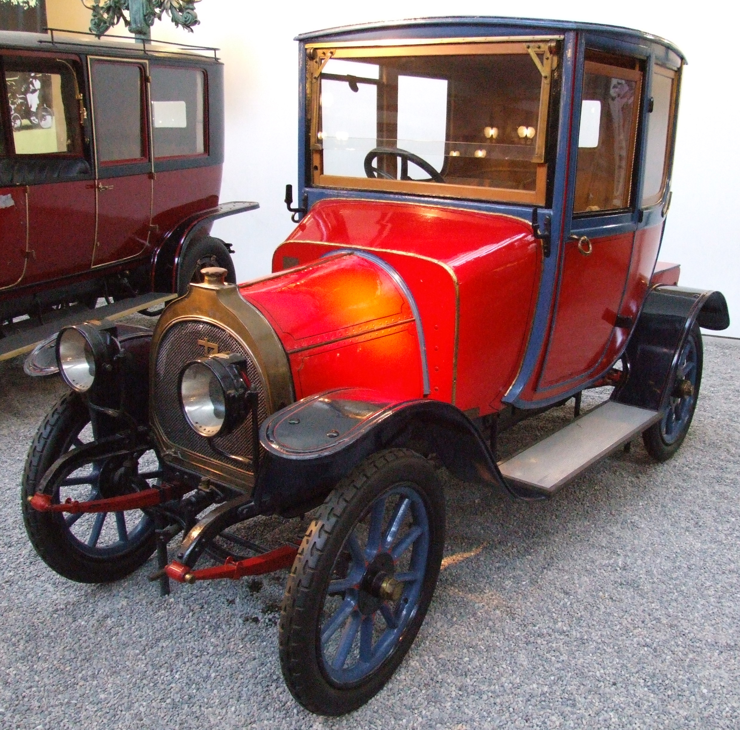 Zedel Coupé Docteur CI von Zedel, 1911, 4 Zylinder, 1954 ccm, 4 PS (CV, HP), 48 km/h, Cité de l'Automobile, Mulhouse, Frankreich